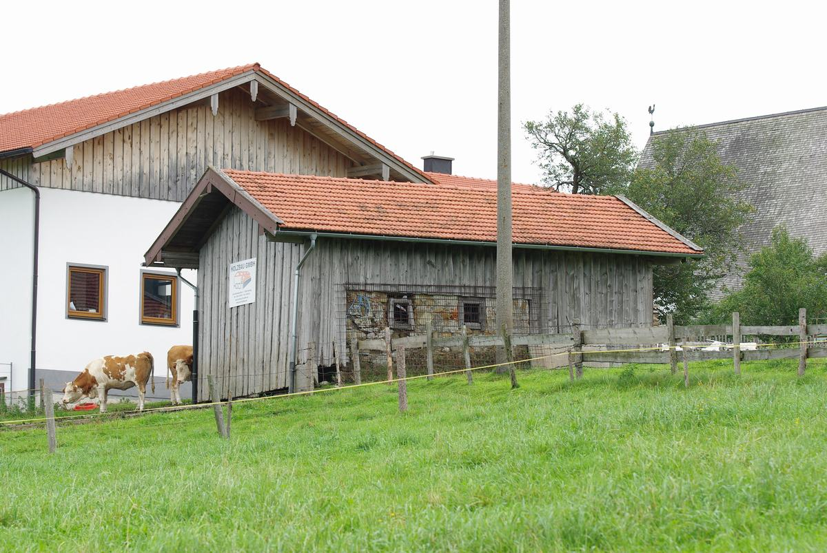 Ulrichshögl 13b, 83404 Ainring zugehöriges BrechlbadThis is a photograph of an architectural monument.